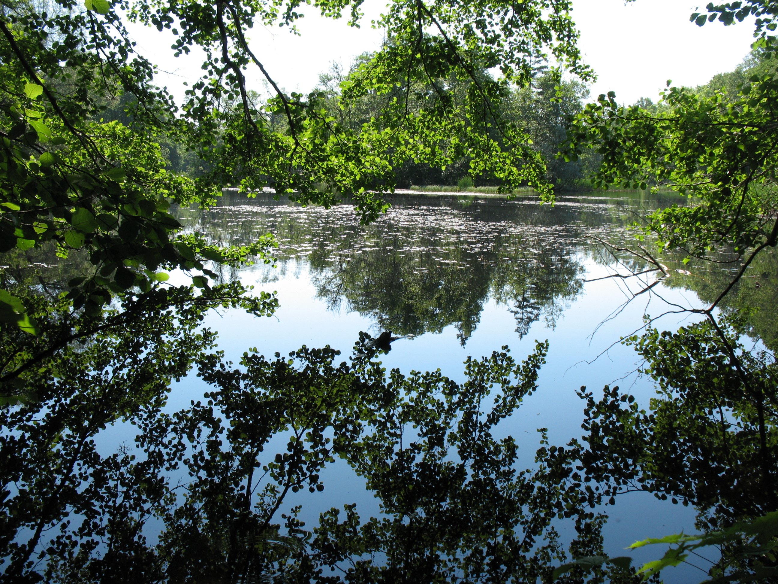 Harku mõisapargi järv